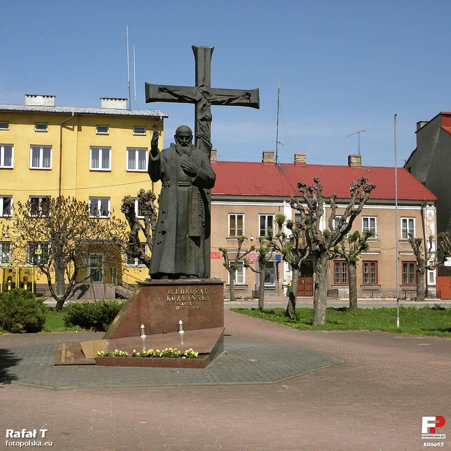 Pomnik błogosławionego o.Honorata Koźmińskiego.